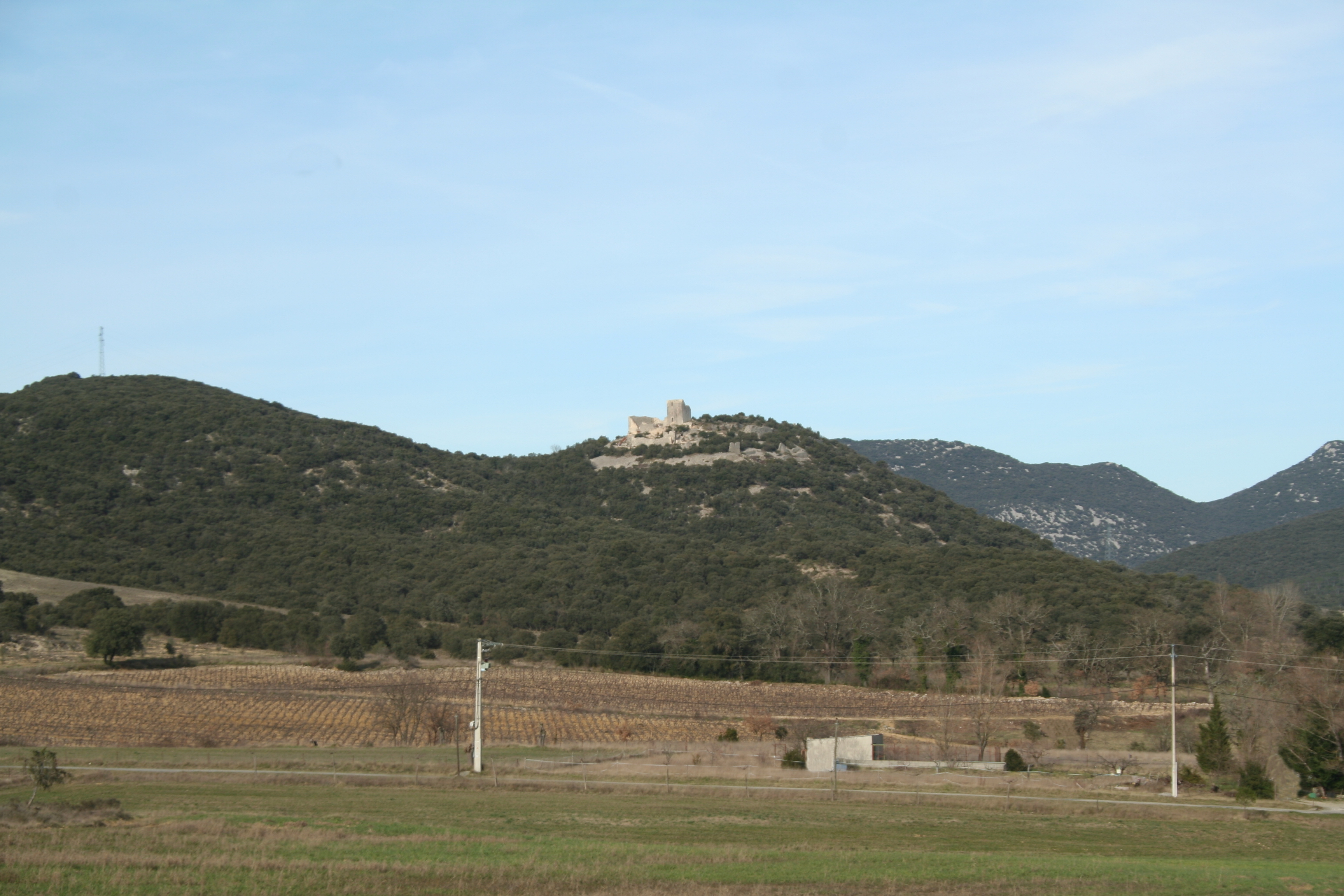 Montoulieu (Hérault) - château